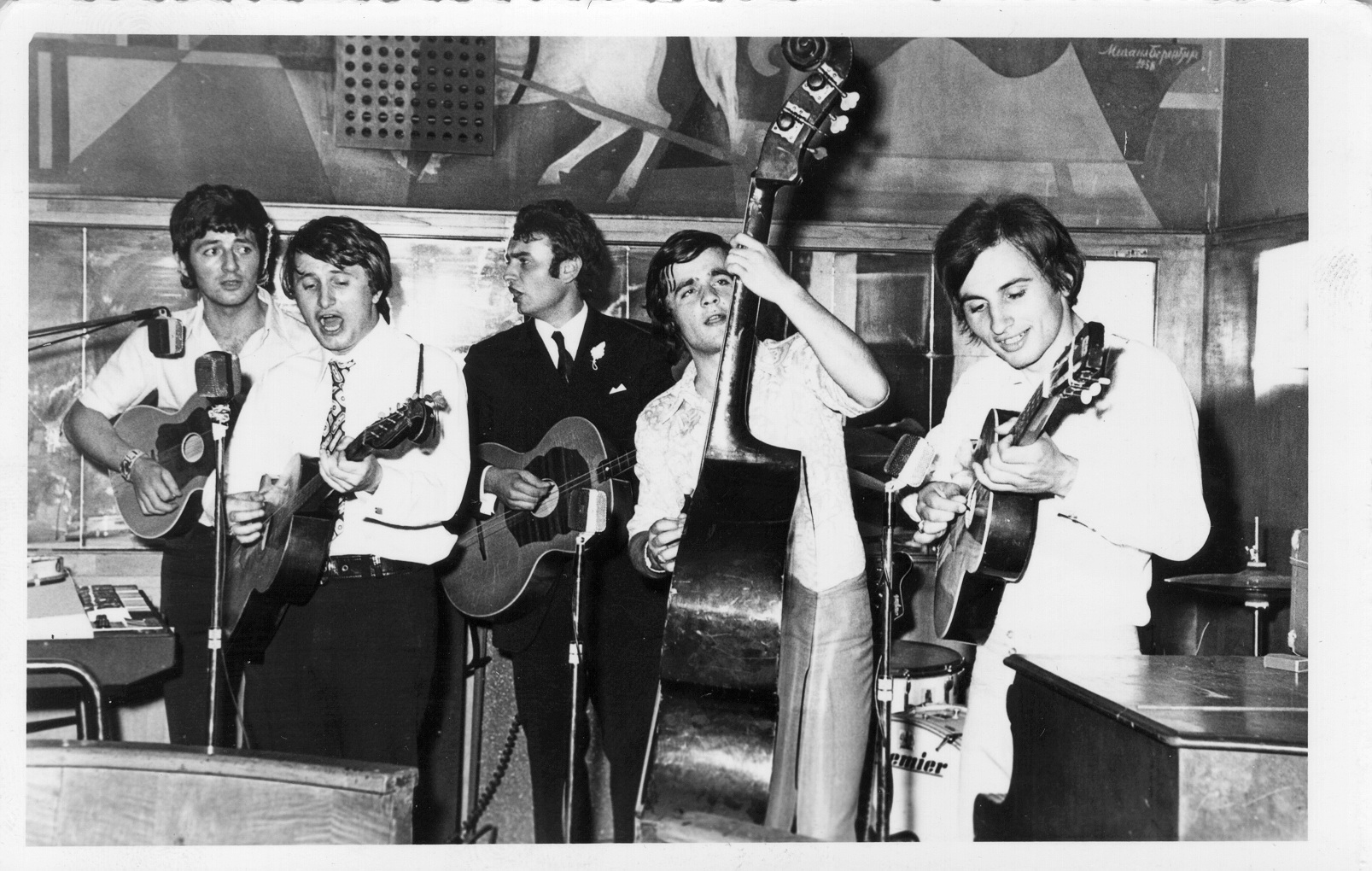 Srpski (latinica): VIS Omege sa tamburama 1971 godine Hotel Vojvodina Zrenjanin